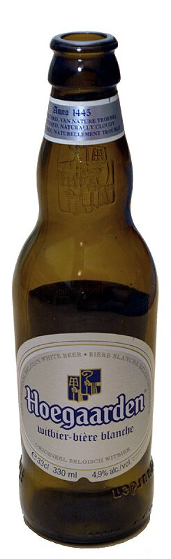 Hoegaarden witbier from Belgium.